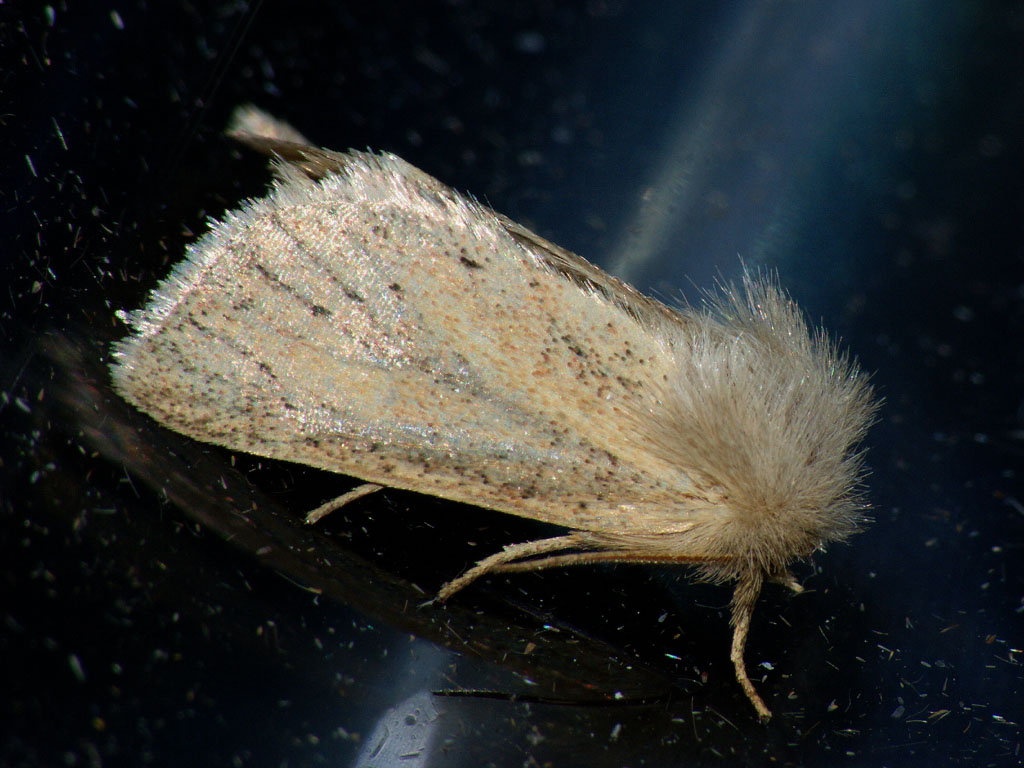 Exemplar found: Russia, Moscow Oblast, Odintsovsky District, near village Pestovo, 05.09.2009, by light МО, Одинцовский р-н, окрестности деревни Пестово, 05.09.2009, на свет